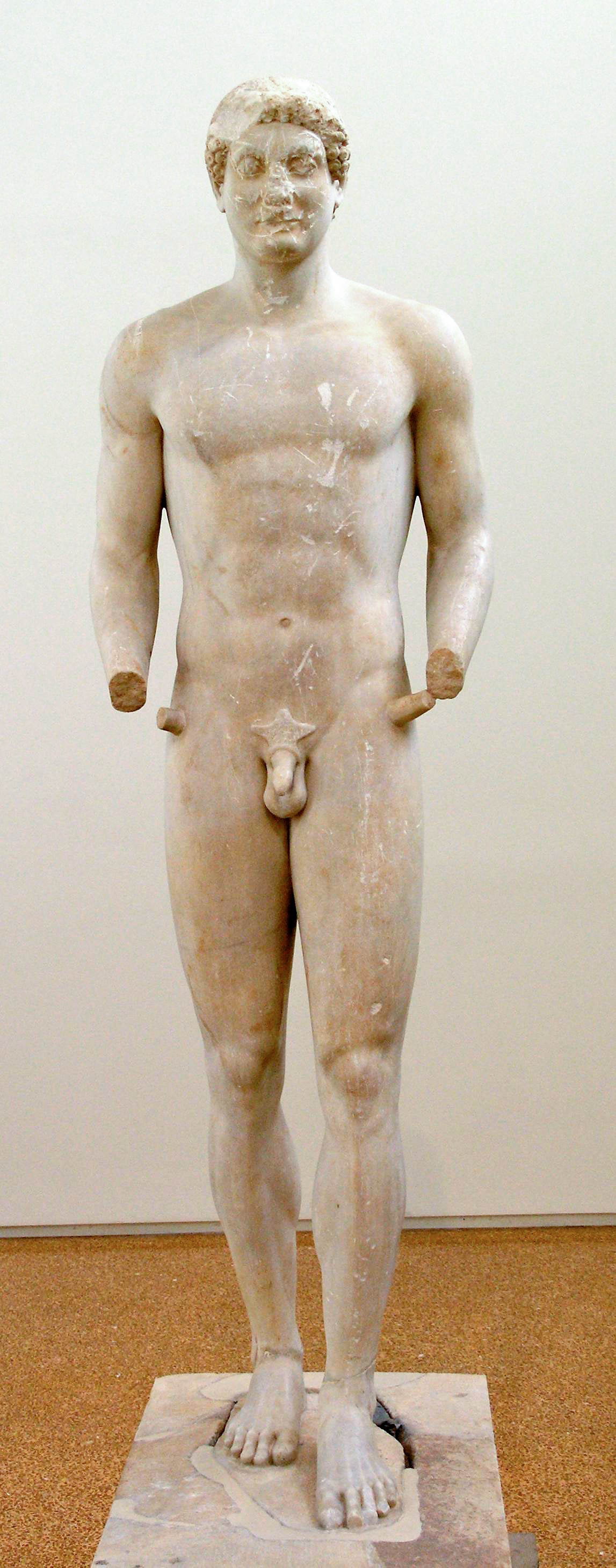 Kouros funéraire en marbre parien, trouvé dans le Mésogée, en Attique. La statue surmontait la tombe d'un jeune aristocrate athénien, dont le nom est inscrit sur la base. Le rendu plastique des muscles, le mouvement des bras et la vigueur générale de la statue la place à la fin de la série des kouroi : il s'agit d'une œuvre clef dans le développement de la sculpture, marquant la transition entre la fin de l'époque archaïque et l'époque classique.